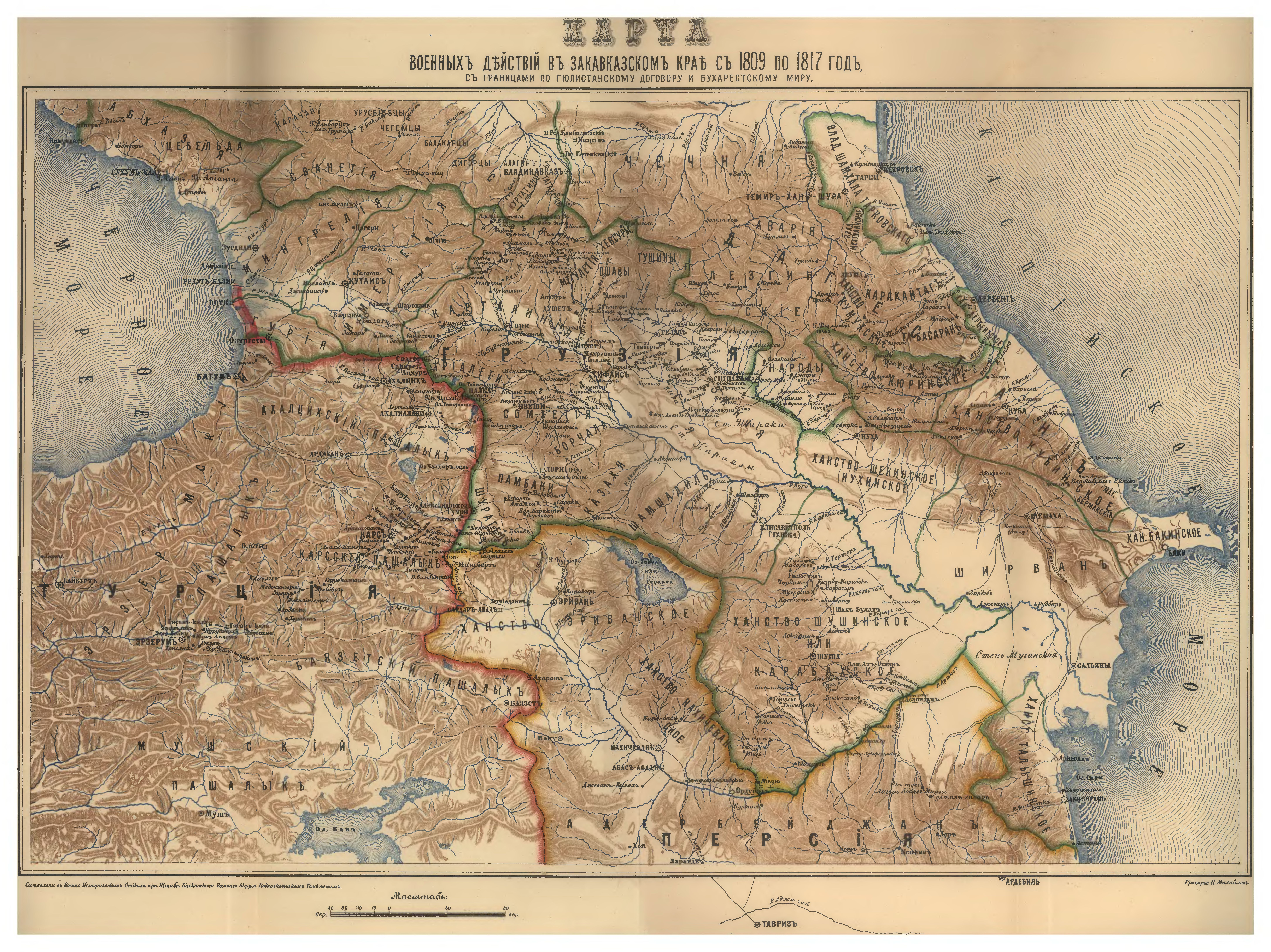 Cənubi Qafqaz 1809-1817-ci illərdə (xəritə)